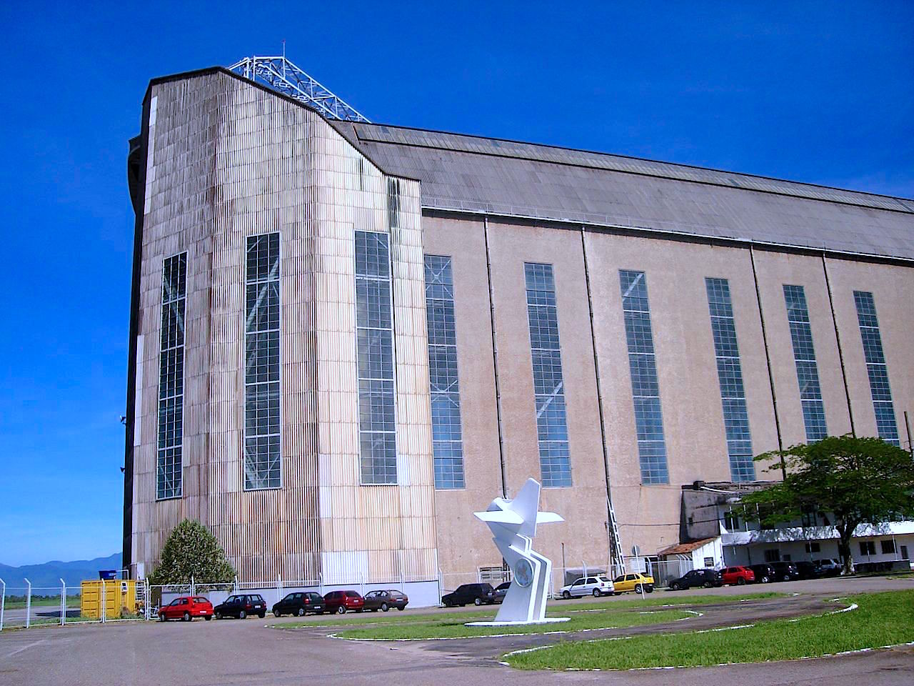 Detalhes do Hangar do Zeppelin